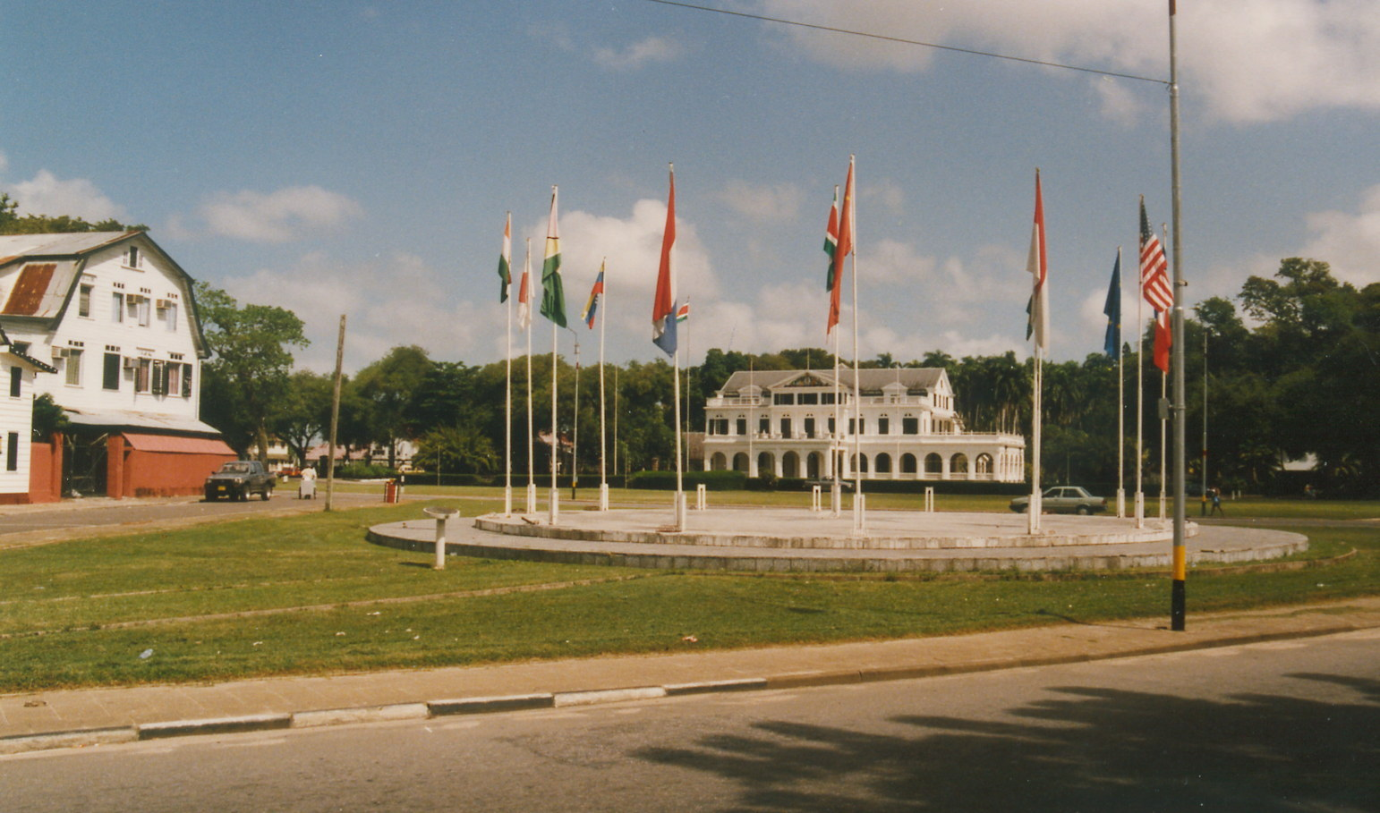 Präsidenten Palais in Paramaribo, Suriname